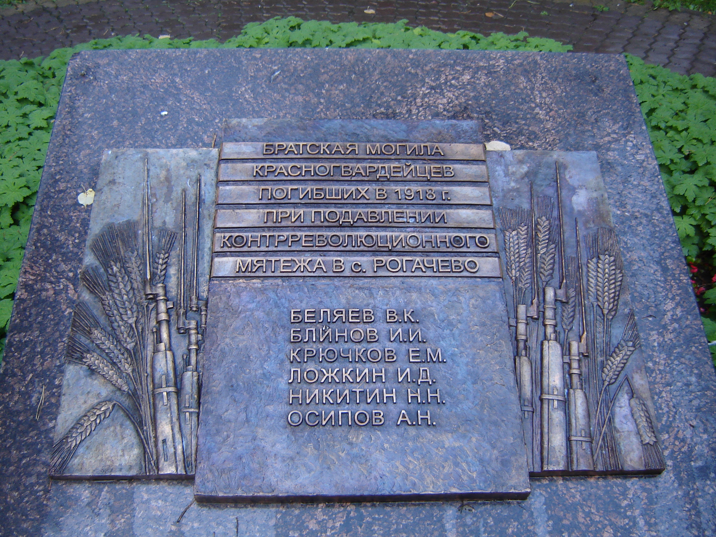 Памятник-захоронение погибшим красногвардейцам в августе 1918 г., расположенный в Дмитрове. Красногвардейцы погибли при подавлении крестьянского бунта в с. Рогачёво Дмитровского уезда (района). Памятник установлен в 2016 г. на месте разрушенного в 2005 г. советского обелиска-захоронения